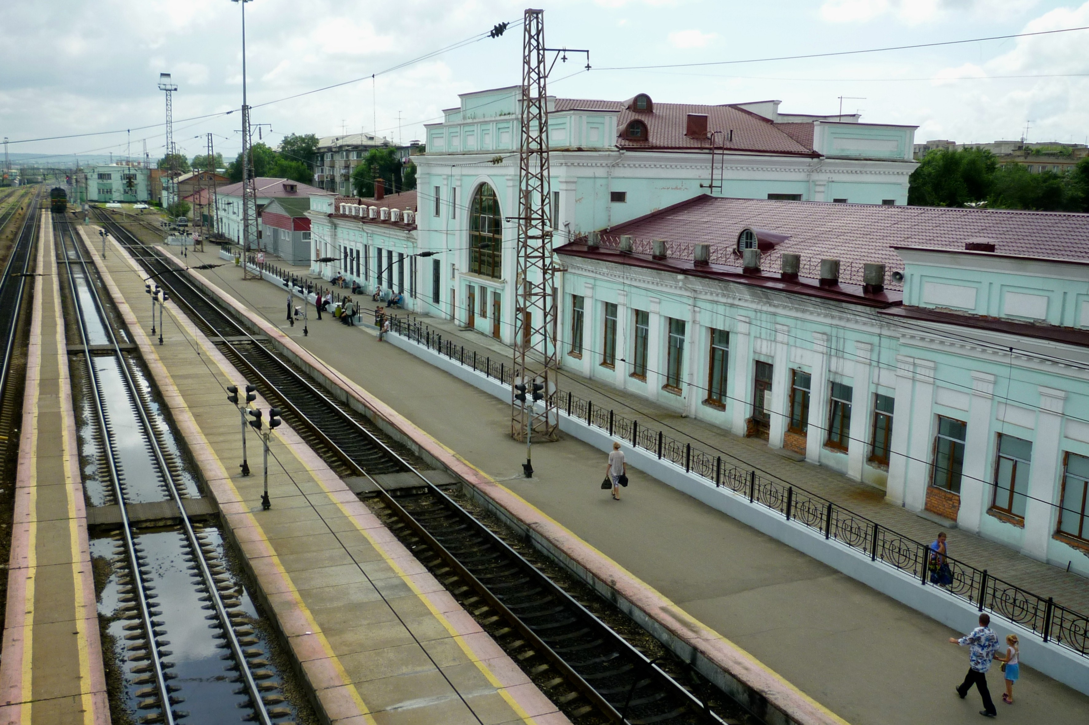 Здание железнодорожного вокзала: площадь Вокзальная, 2, Уссурийск, Приморский край